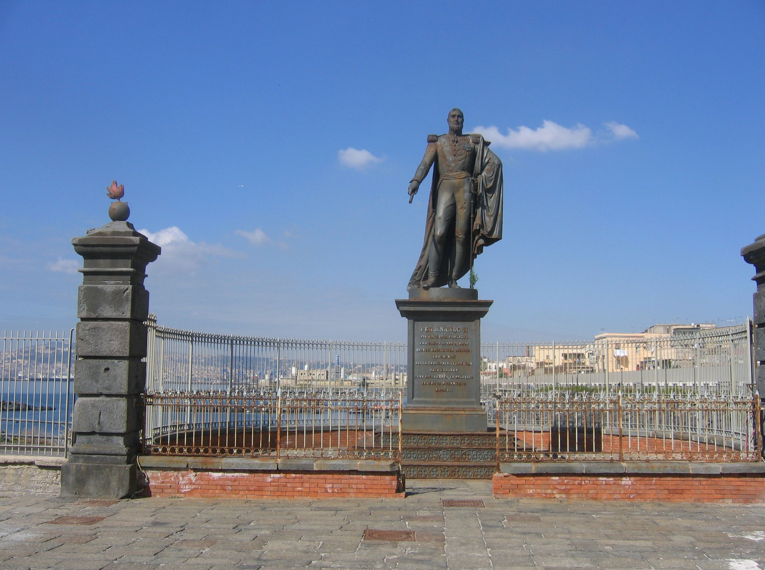 Statue Ferdinand II., König beider Sizilien, vor 1860